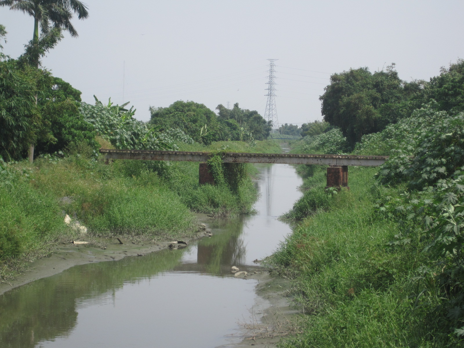 位在佳里糖廠附近的菜寮溪景色，圖中橋樑為糖鐵隆田線的鐵道橋。